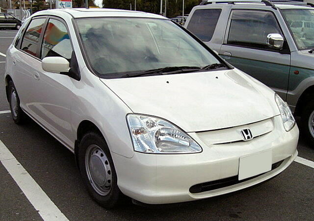 ホンダ・シビック（7代目・日本仕様）